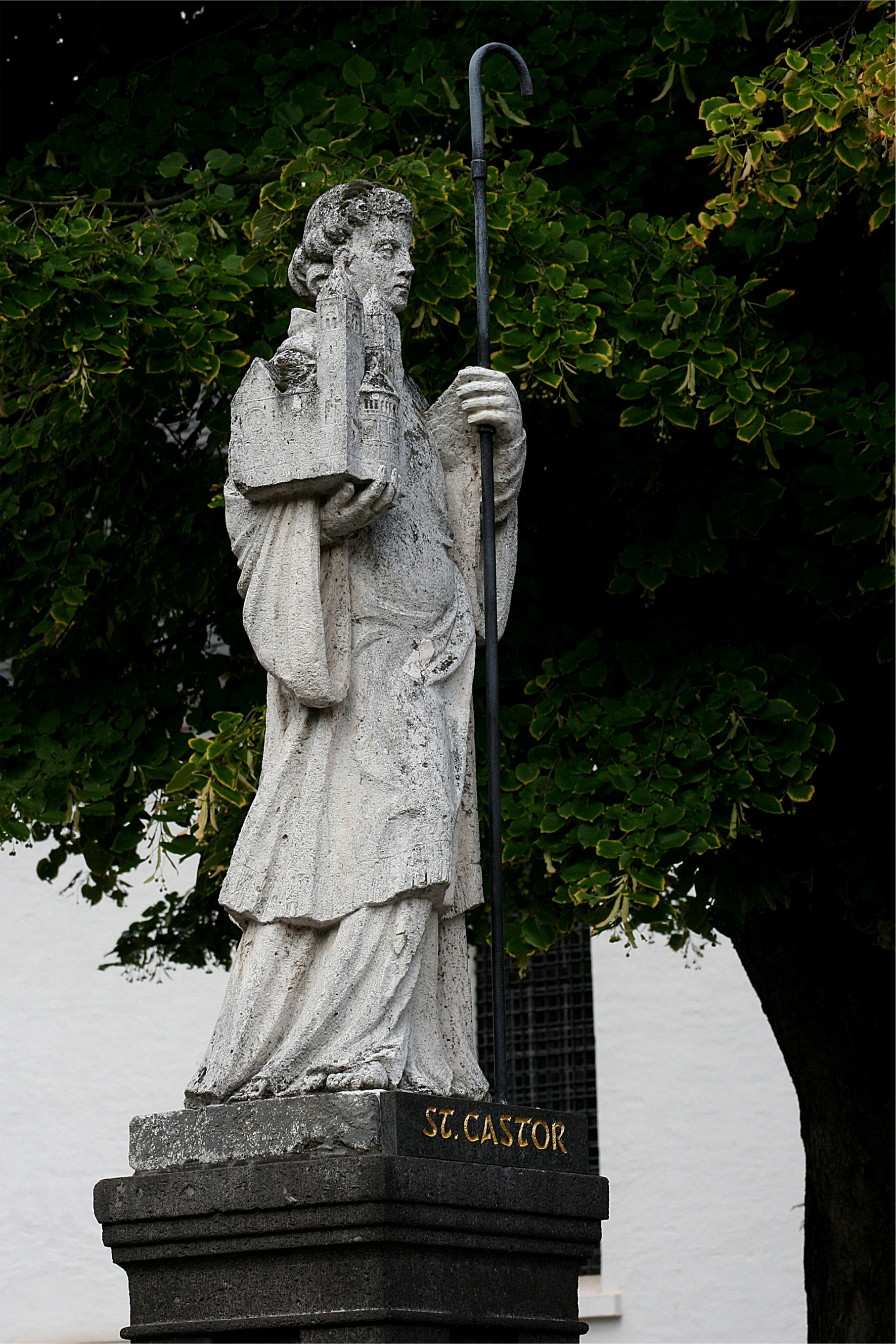 Statue auf dem Castorbrunnen in Karden